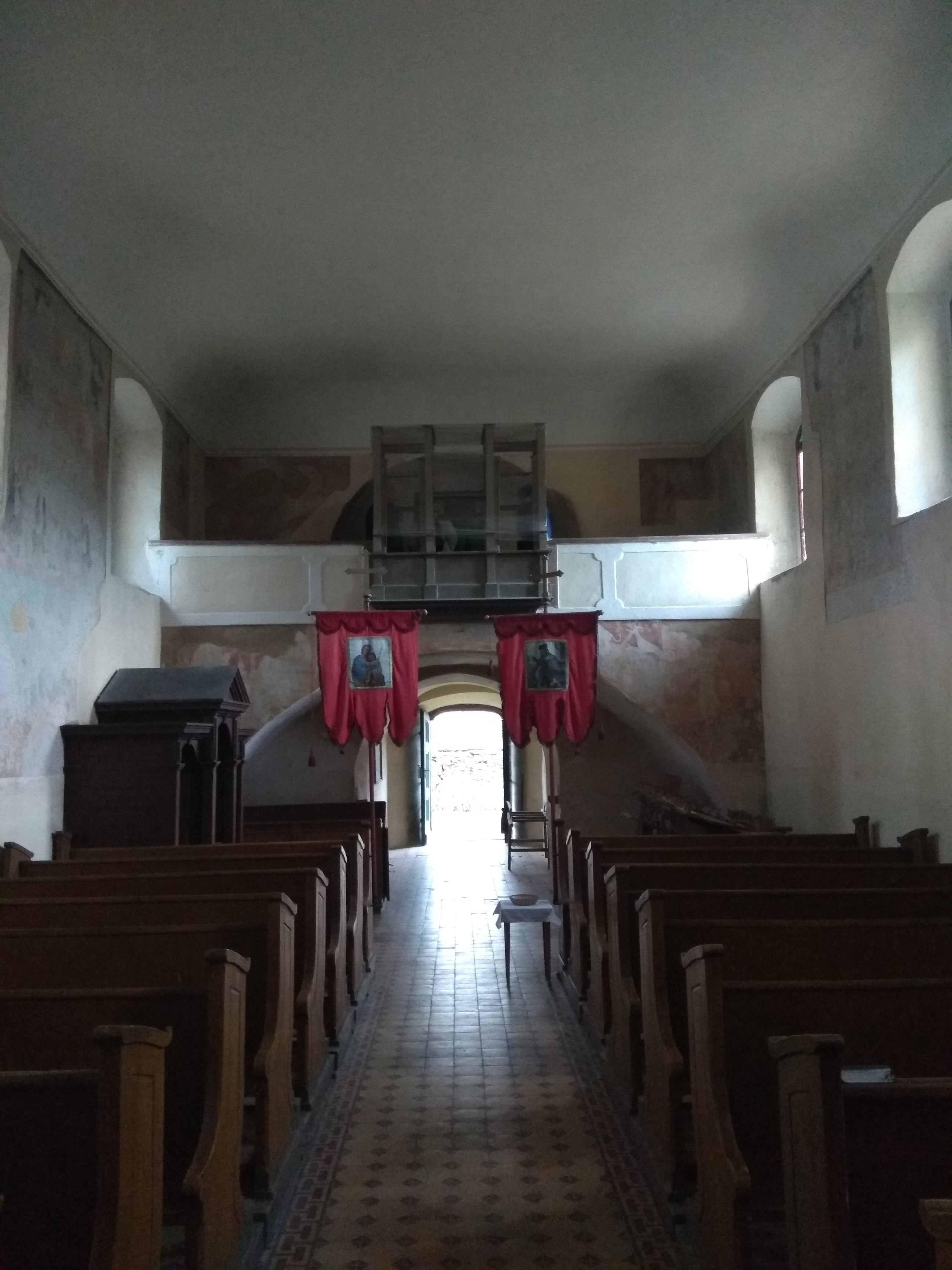 Olešky kostel - interiér